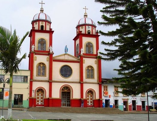 Plaza Principal Pueblo Rico Risaralda